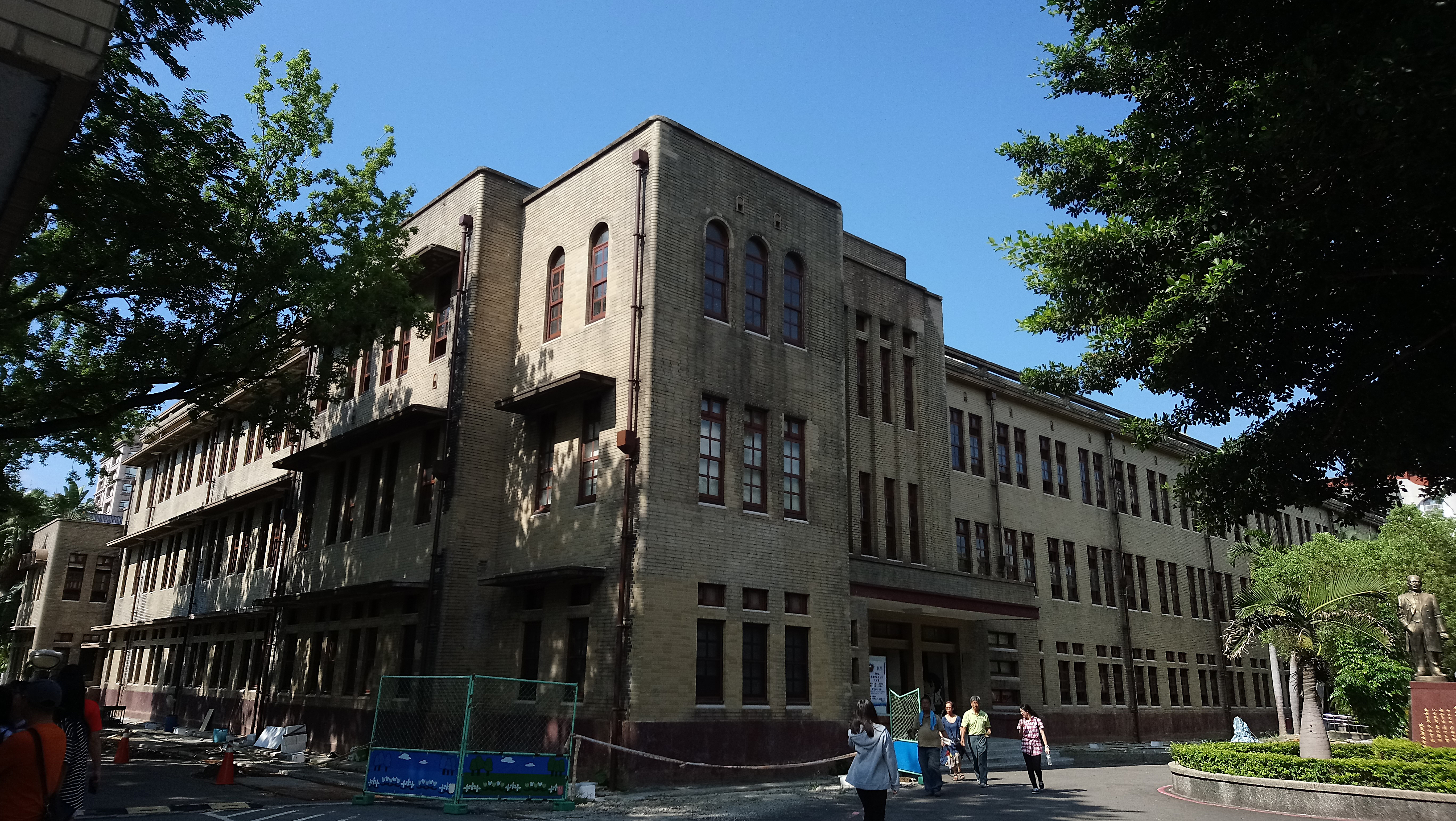 臺北州立臺北第三高等女學校,臺北市中山區朱厝崙次分區力行里